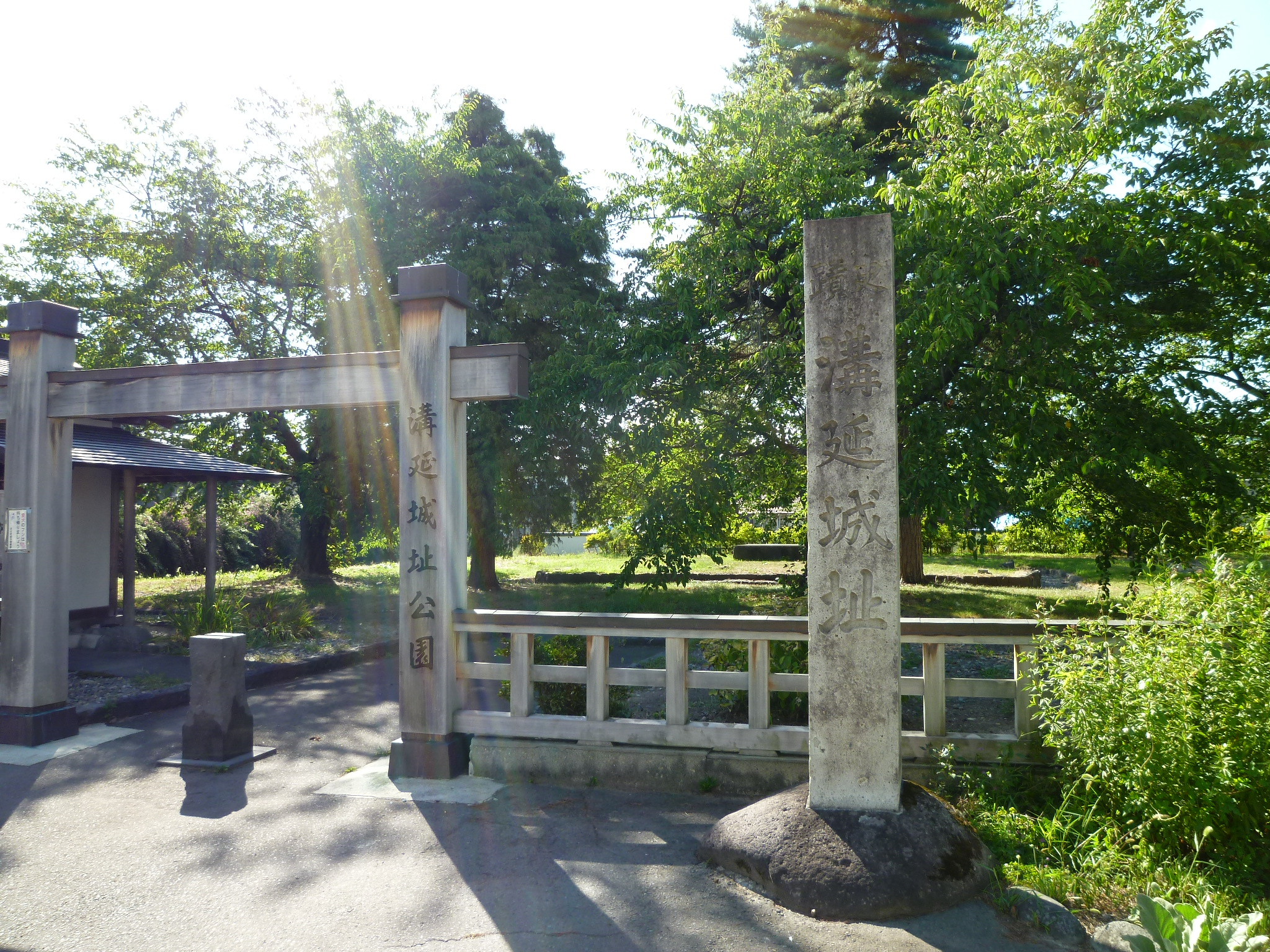 溝延城跡（山形市河北町）